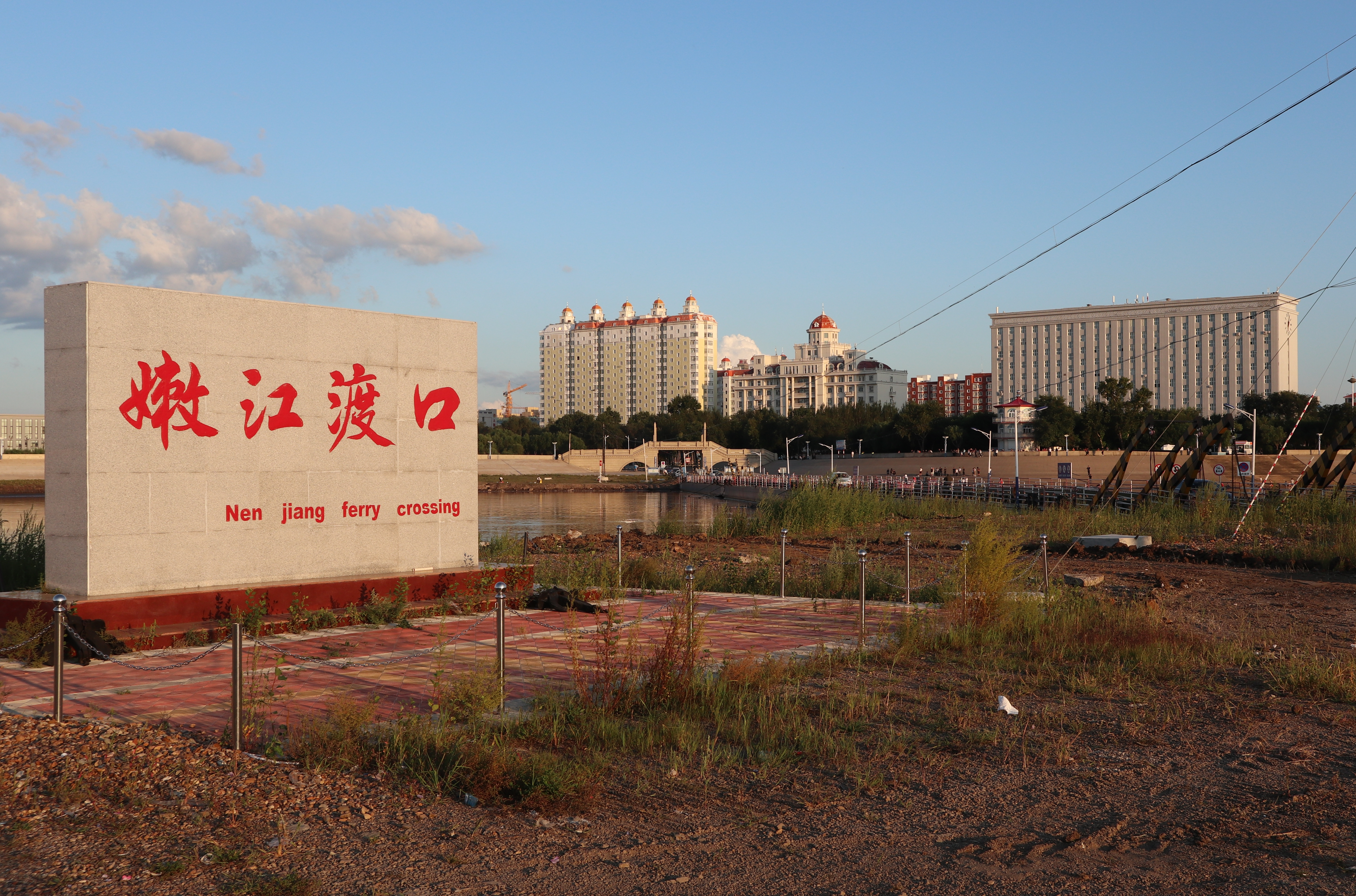 嫩江渡口，拍摄于内蒙古自治区莫力达瓦达斡尔族自治旗辖境，对岸是黑龙江省嫩江市。